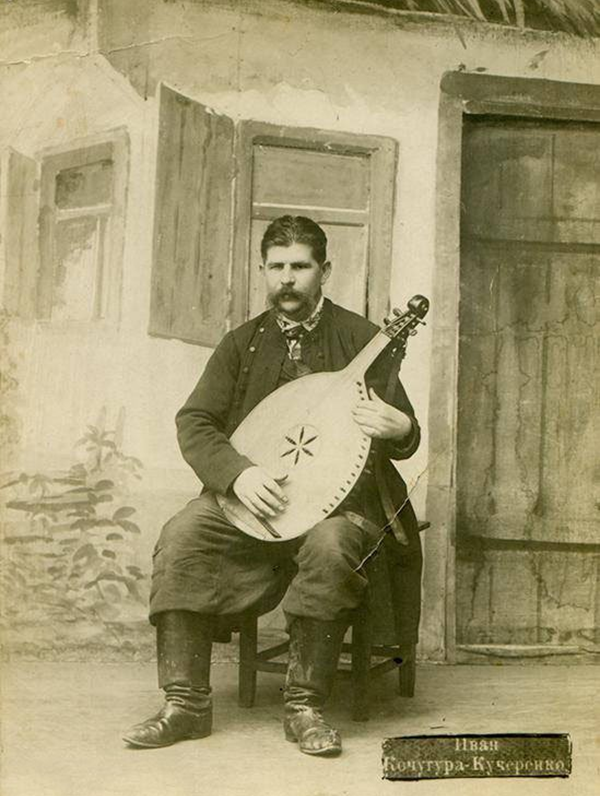 Видатний український кобзар І.І. Кучугура-Кучеренко